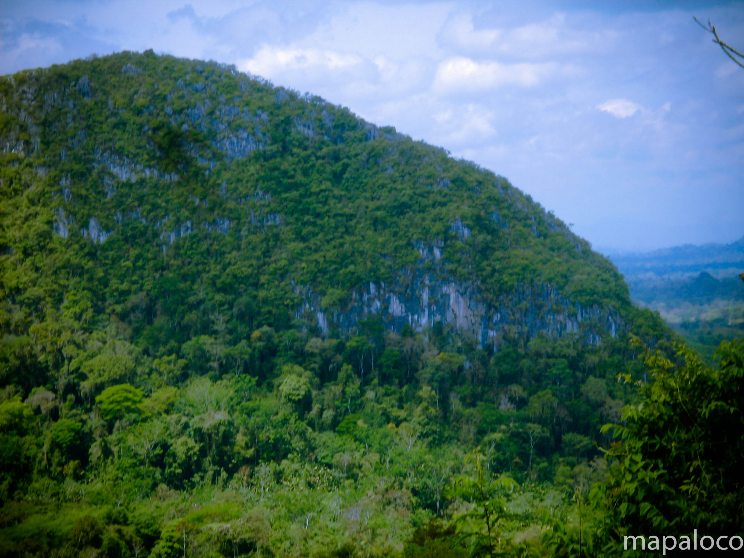 Cerro WAYLAWAS.